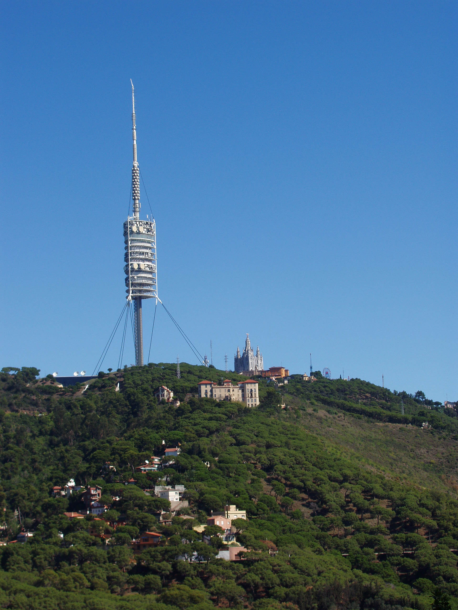 Collserola Comunications Tower. Architect: Norman Foster Torre de Comunicaciones de Collserola: Arquitecto: Norman Foster Fotografia de la Torre de Comunicaciones de Collserola en Barcelona (Spain) desde la carretera de les Aigües. Autor: Vicens